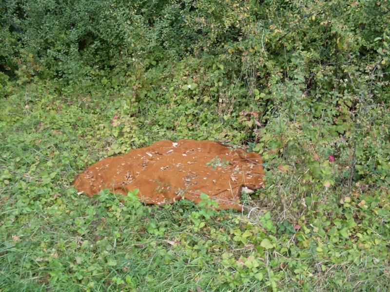 Illegális szemétlerakás (Erdőtelki Égerláp Természetvédelmi Terület, Heves megye)